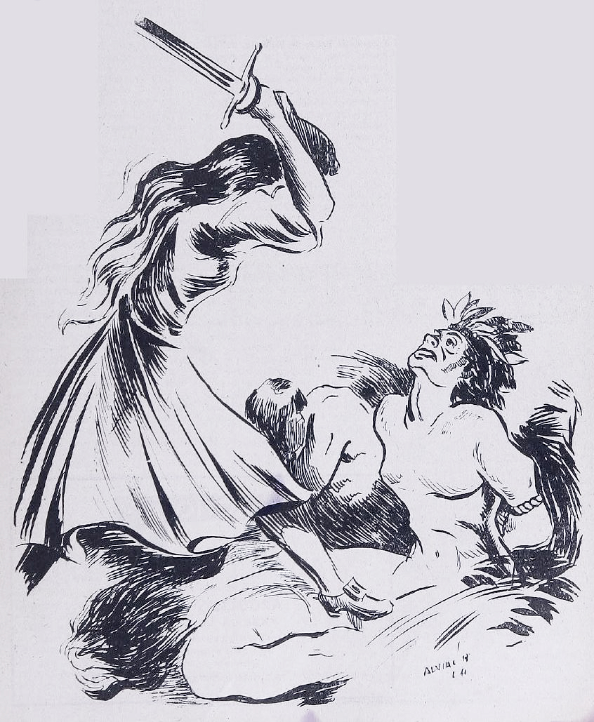 Ilustración de Inés Suárez asesinando a los caciques durante el ataque a Santiago el 11 de septiembre de 1541.